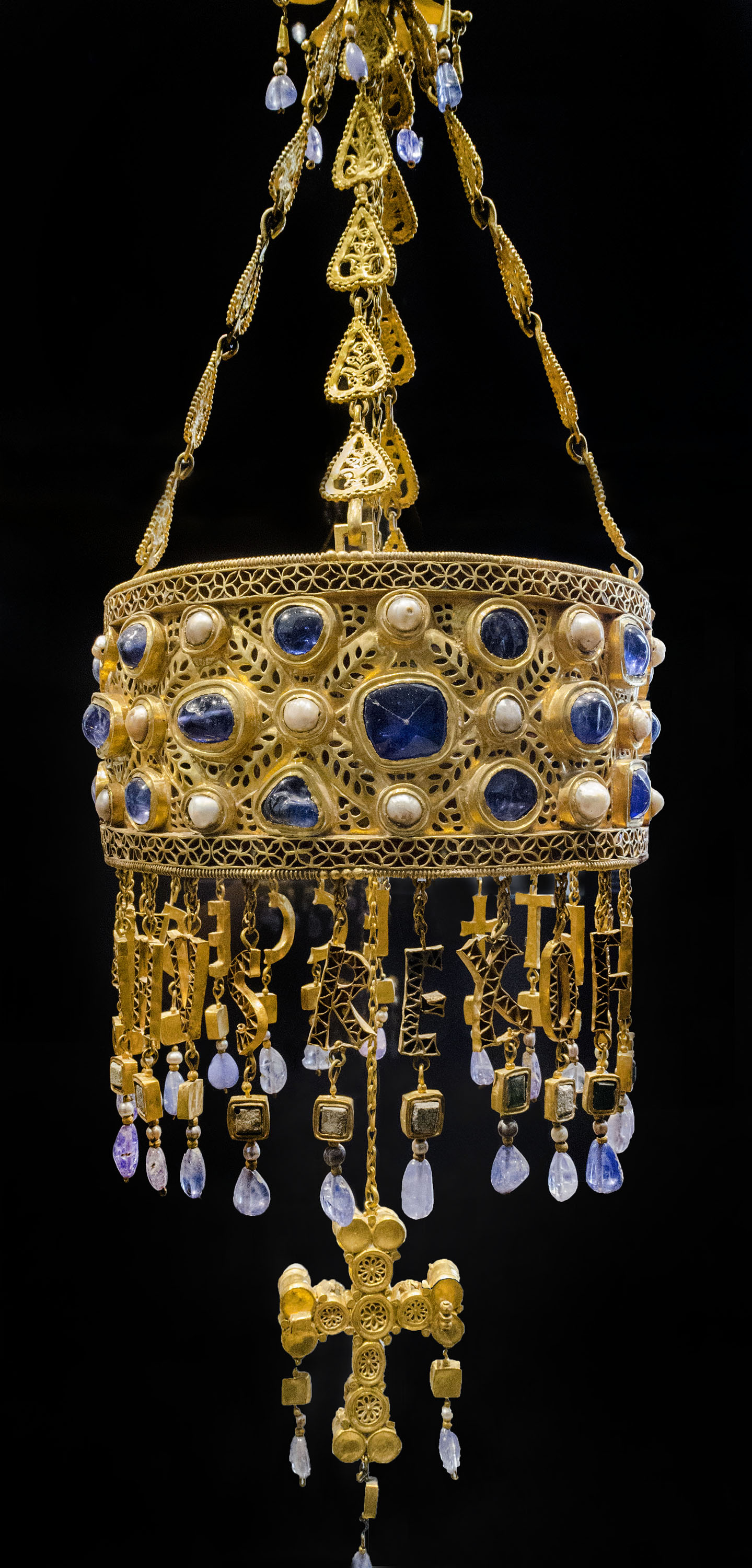 (R)ECCESVINTHUS REX OFFERET es la frase formada por letras colgantes en esta corona votiva del siglo VII y de unos 21 cm de diámetro localizada en Guarrazar, un yacimiento visigodo de Toledo. El llamado tesoro de Guarrazar se encontró el 25 de agosto de 1858 por parte de Francisco Morales y María Pérez. Según su testimonio iban por un camino y vieron algo que brillaba entre unas losas, aparentemente descubiertas por una gran tormenta del día antes. El "tesoro" estaba formado por varias coronas (más de veinte), cruces, cálices y otros objetos de oro y gemas en una arqueta. Tras varias ventas clandestinas, un lote de piezas fue vendido al gobierno de Francia a principios de 1859. En 1941 se hizo un canje de obras que supuso la entrega a España de seis de las nueve coronas que integraban esta parte del conjunto. Actualmente se exponen en el Museo Arqueológico Nacional en Madrid. Un segundo conjunto se mantuvo oculto por otra familia durante más de dos años, durante los cuales llegaron a desmontar y vender más de tres cuartas partes de las piezas. En 1861 le entregaron a la reina Isabel II las pocas piezas que quedaban, entre las que estaba una corona ofrecida por el rey Suintila que fue robada en 1921 sin que se haya vuelto a saber de su paradero. Parte del texto anterior se ha tomado de donde hay una extensa información sobre estas piezas.